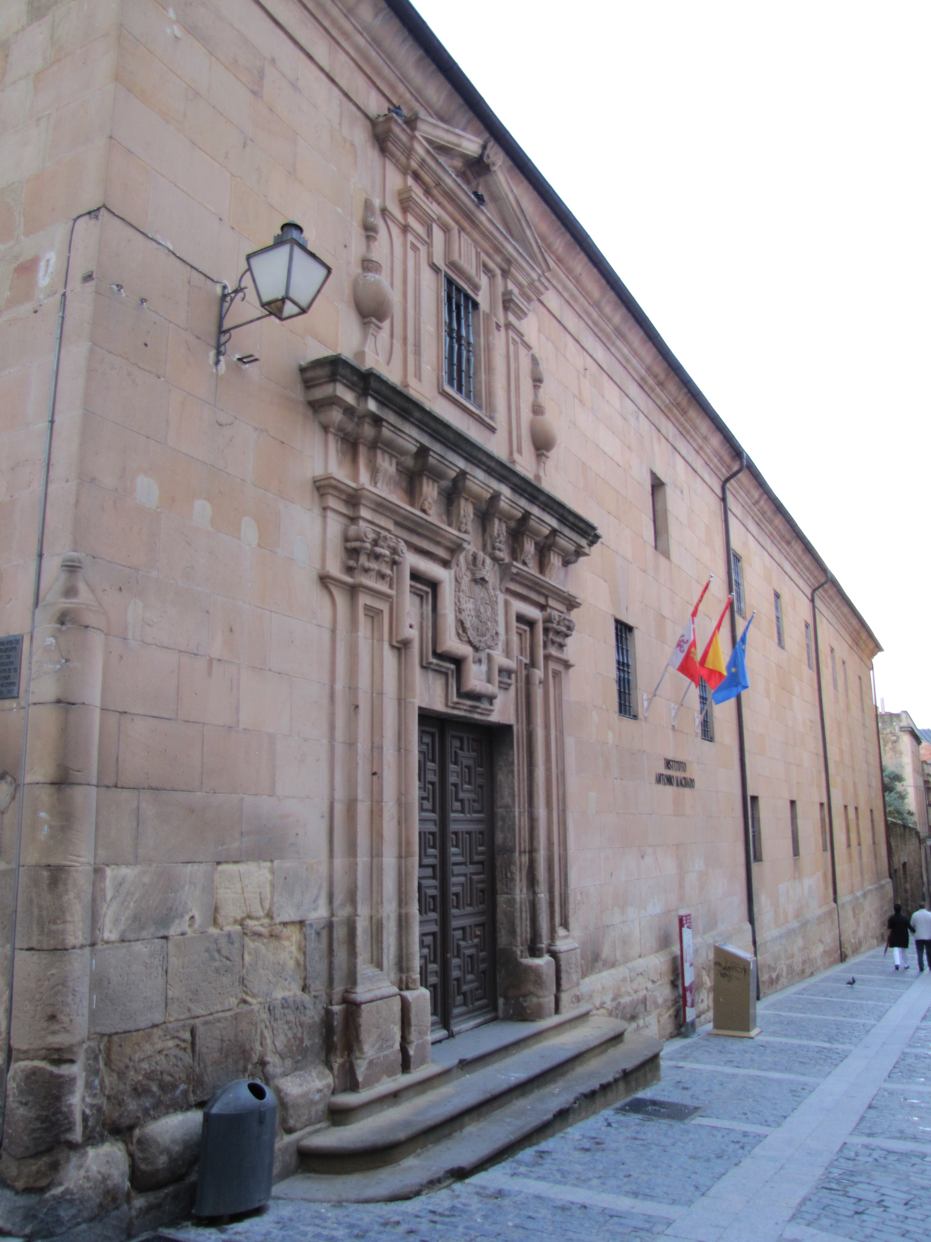 Fachada del Colegio de la Compañía de Jesús en Soria, actual Instituto Antonio Machado.